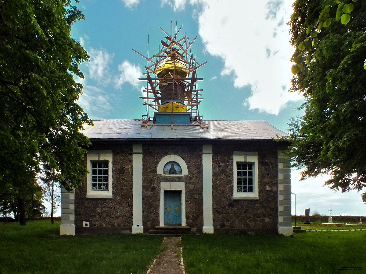 Баршчэва. Свята-Ануфрыеўская царква